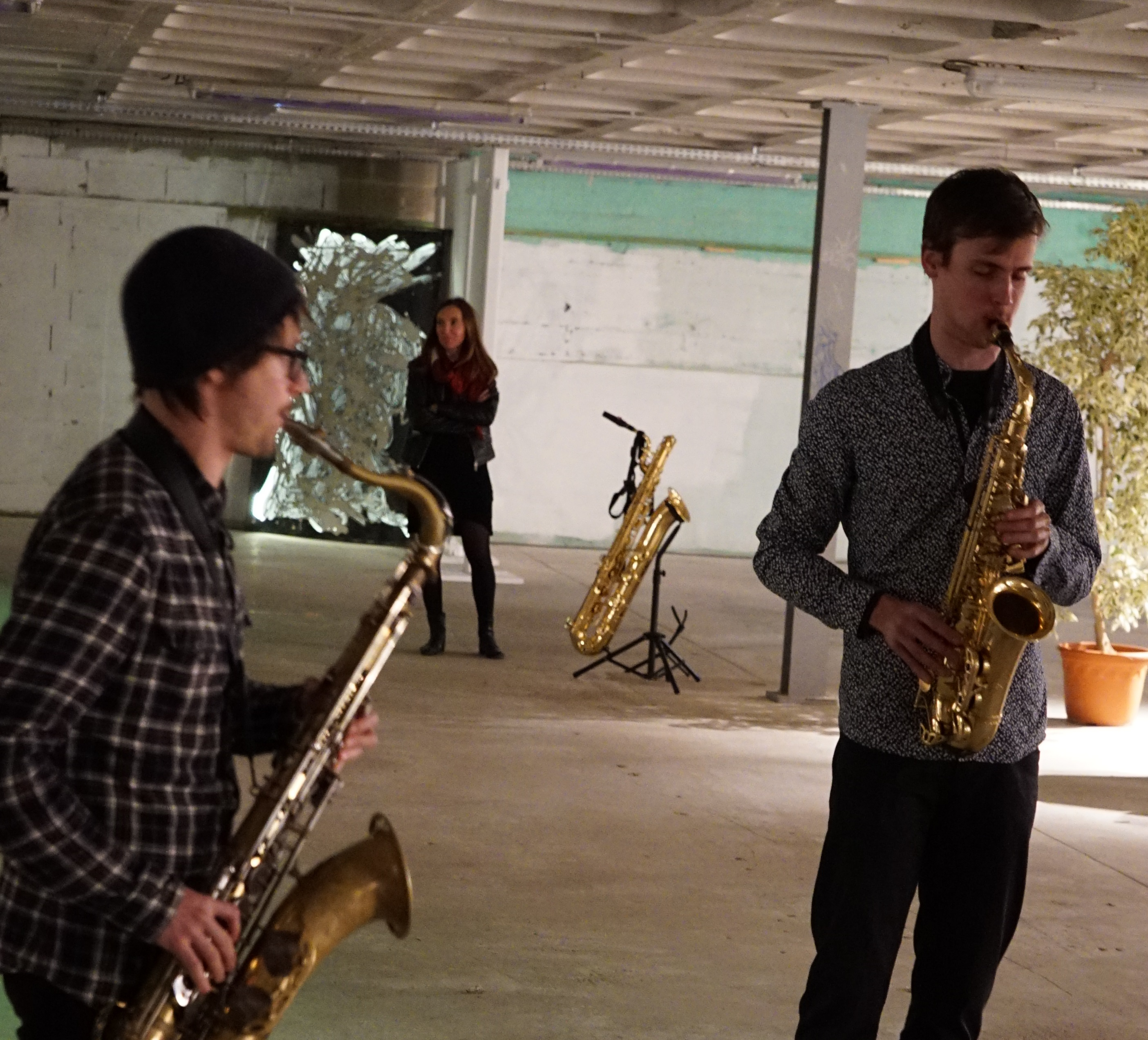 concert du Quatuor Machaut à la fileuse de Reims.